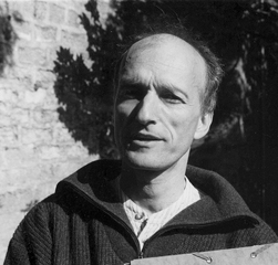 Portrait de Denis Dufour, compositeur